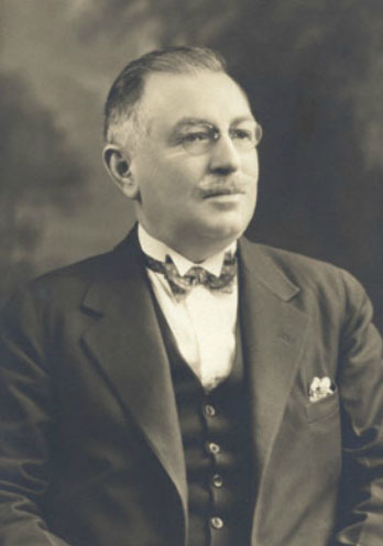 Valmont Martin (1875-1935). Médecin. Il fut maire de Québec en 1926-1927.